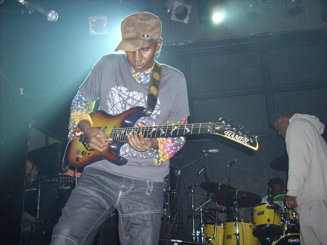 Sala Heineken Madrid , 23 Sept 2008